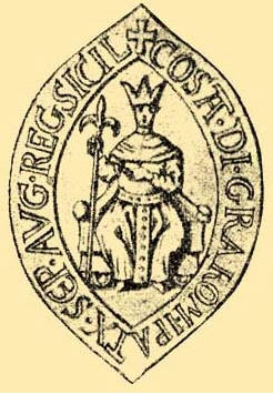 Konstancie Aragonská, manželka Imricha Uherského a Fridricha II.